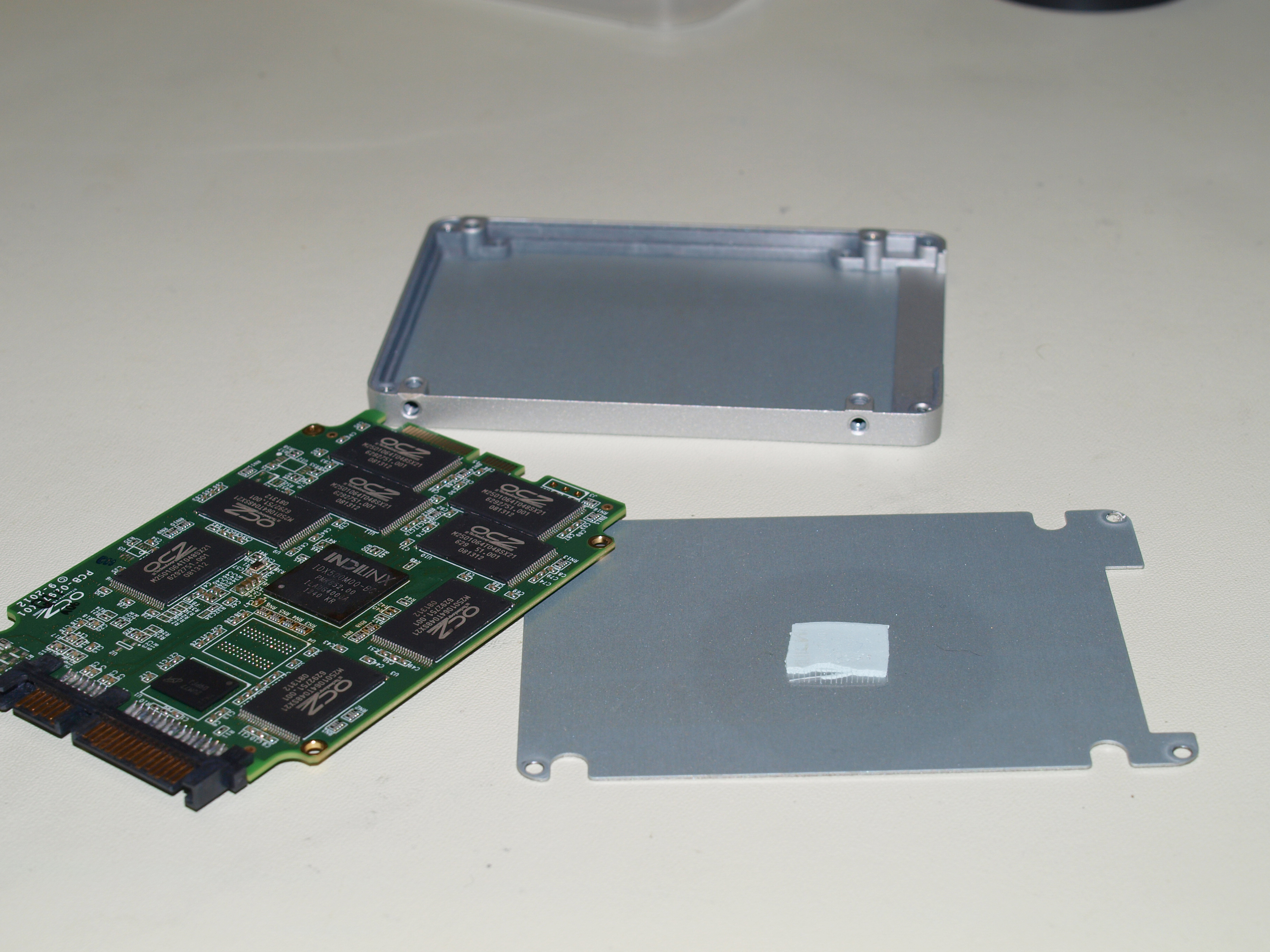 OCZ Vertex SSD sisu